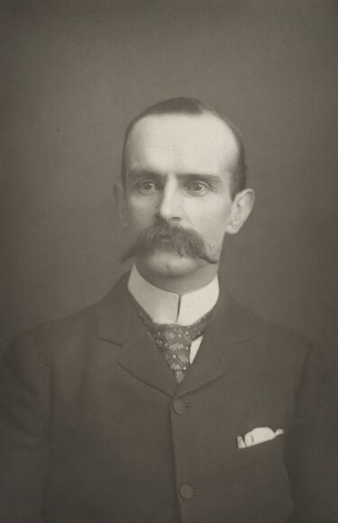 Frederick Lugard, 1st Baron Lugard